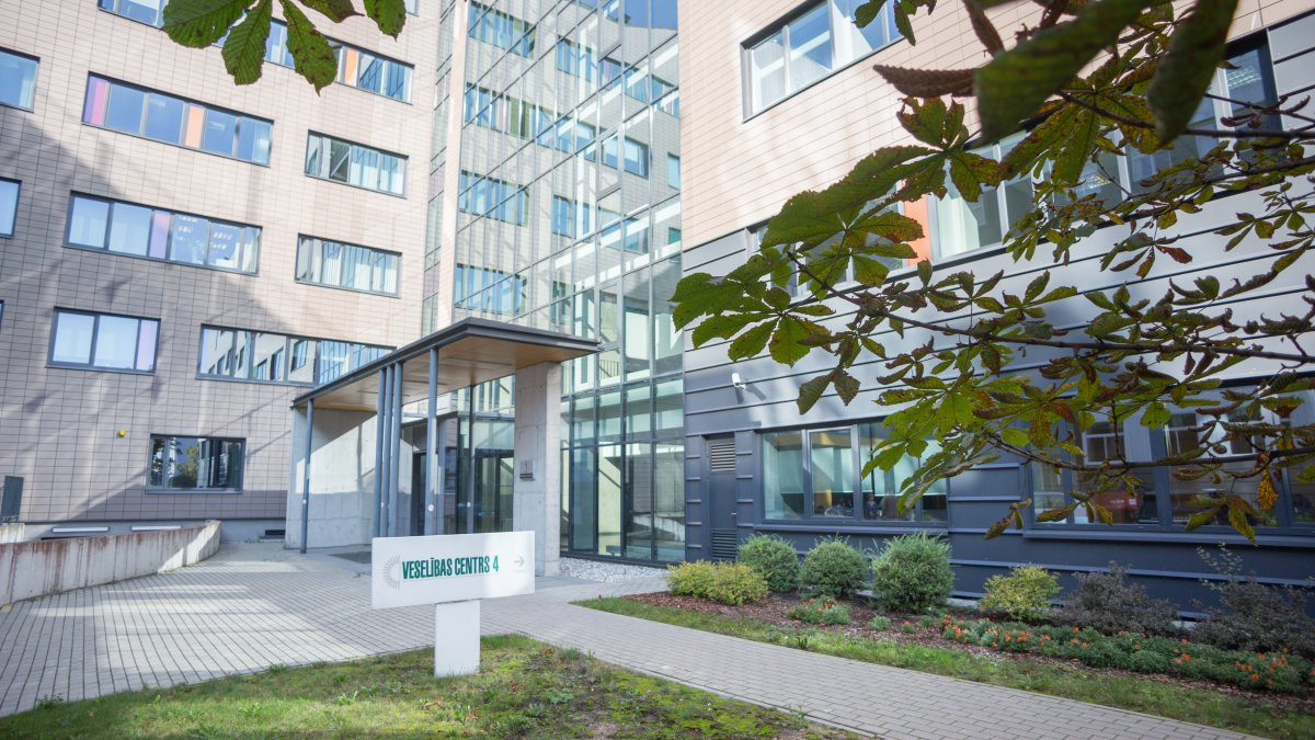 VC4 dermatologijas klinika